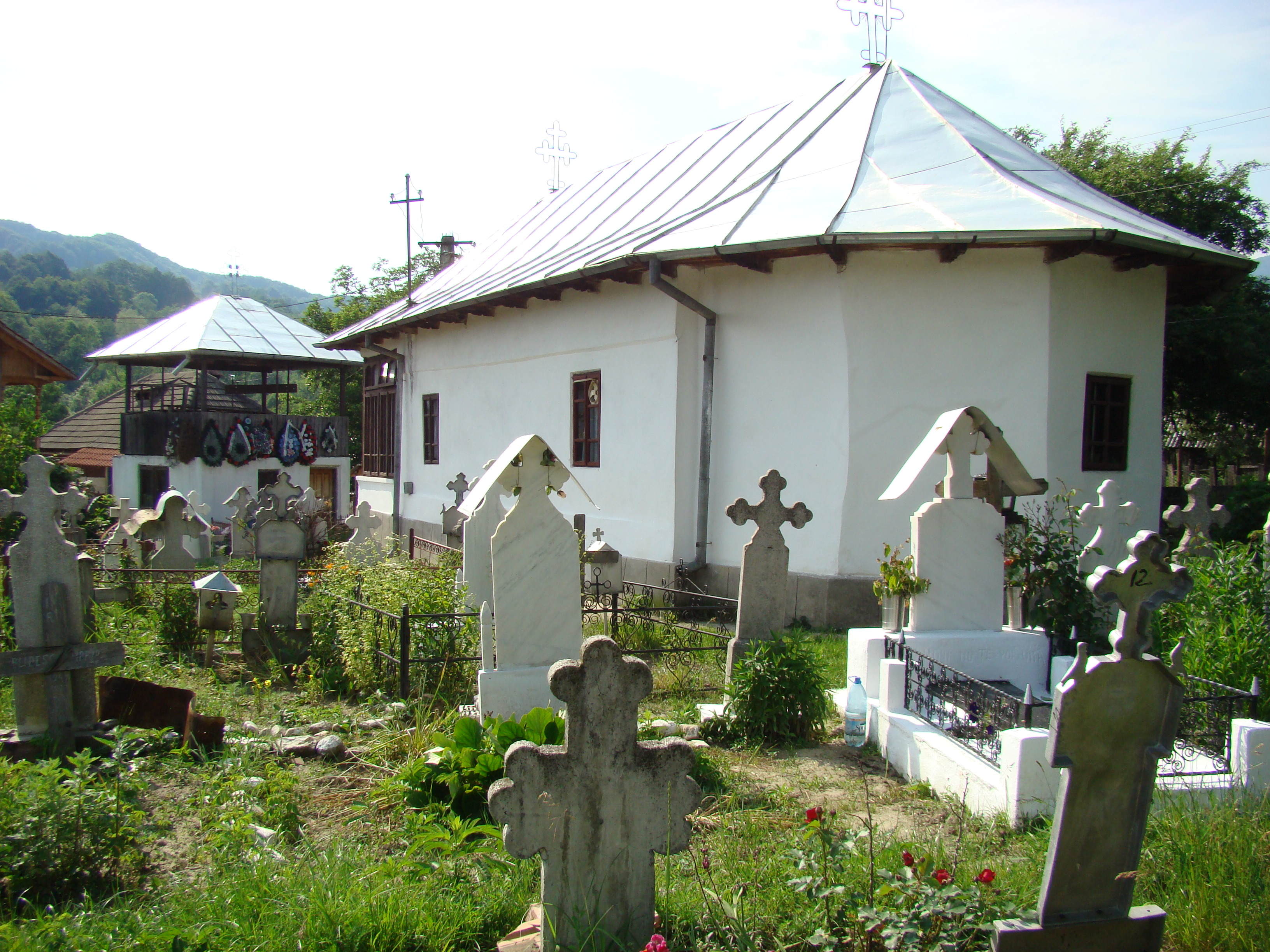 Biserica de lemn „Sf.Nicolae”, sat Bărbătești, cătun Poeni, jud.Vâlcea